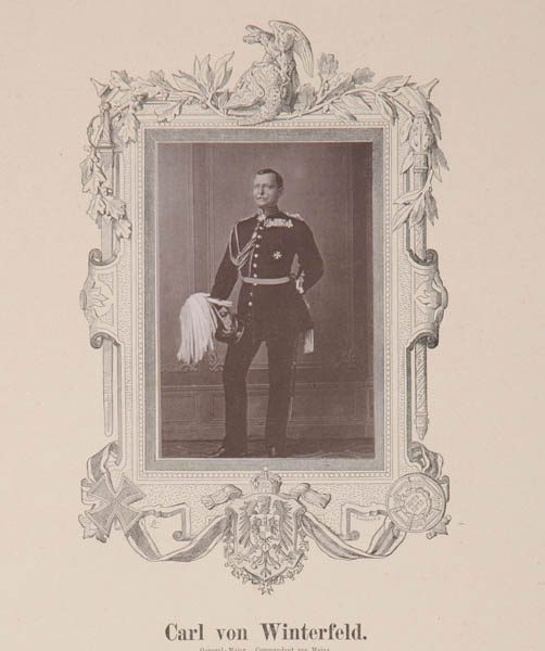 Karl Friedrich Wilhelm von Winterfeldt (* 26. Juli 1813 in Neiße; † 30. März 1867 in Mainz) war preußischer Generalmajor und zuletzt Kommandant der Festung Mainz.